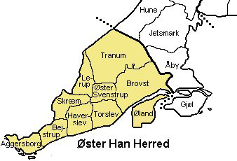 Øster Han Herred, Hjørring Amt, Denmark Source: Map by Svend-Erik Christiansen